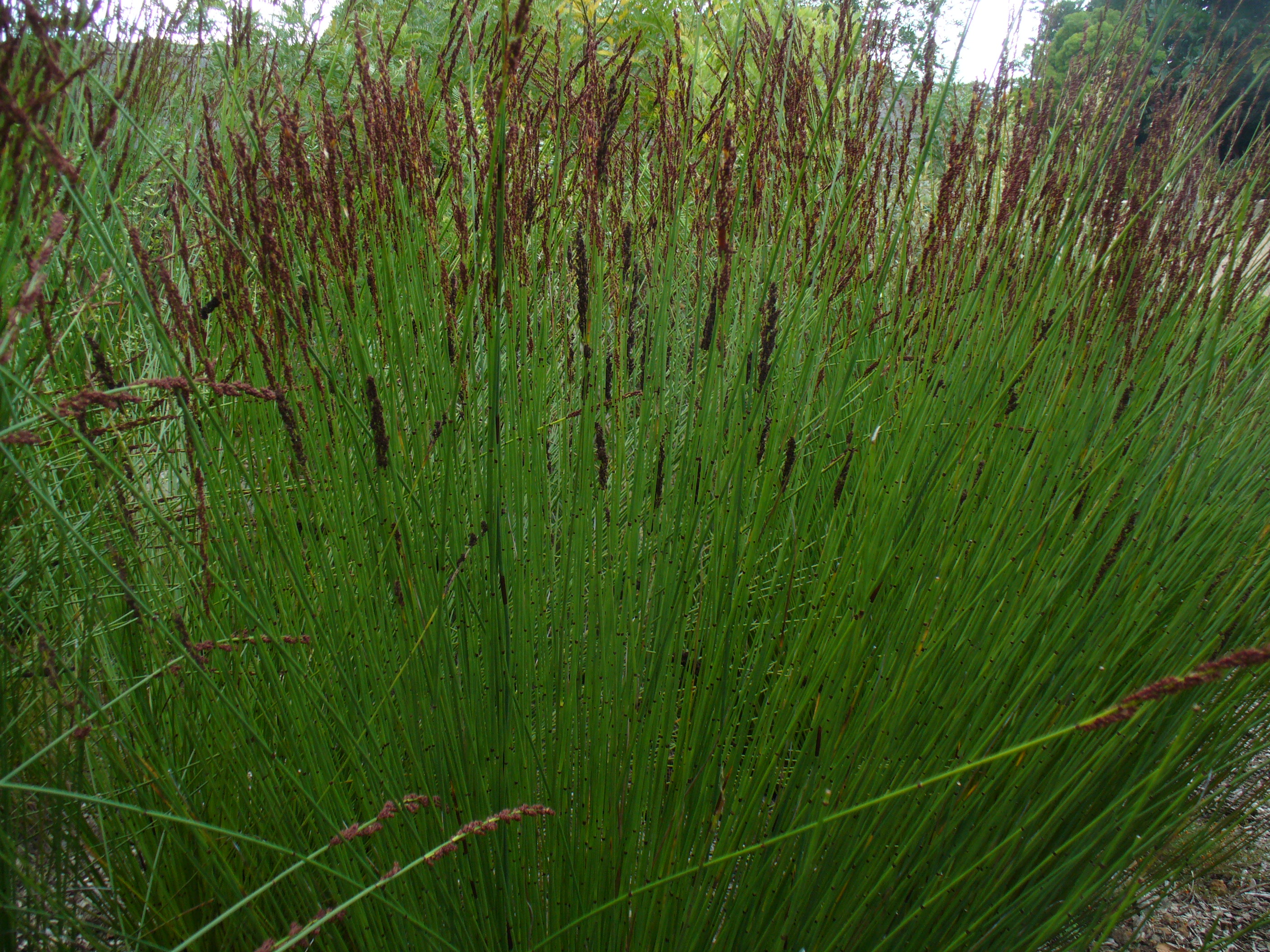 Chondropetalum_tectorum